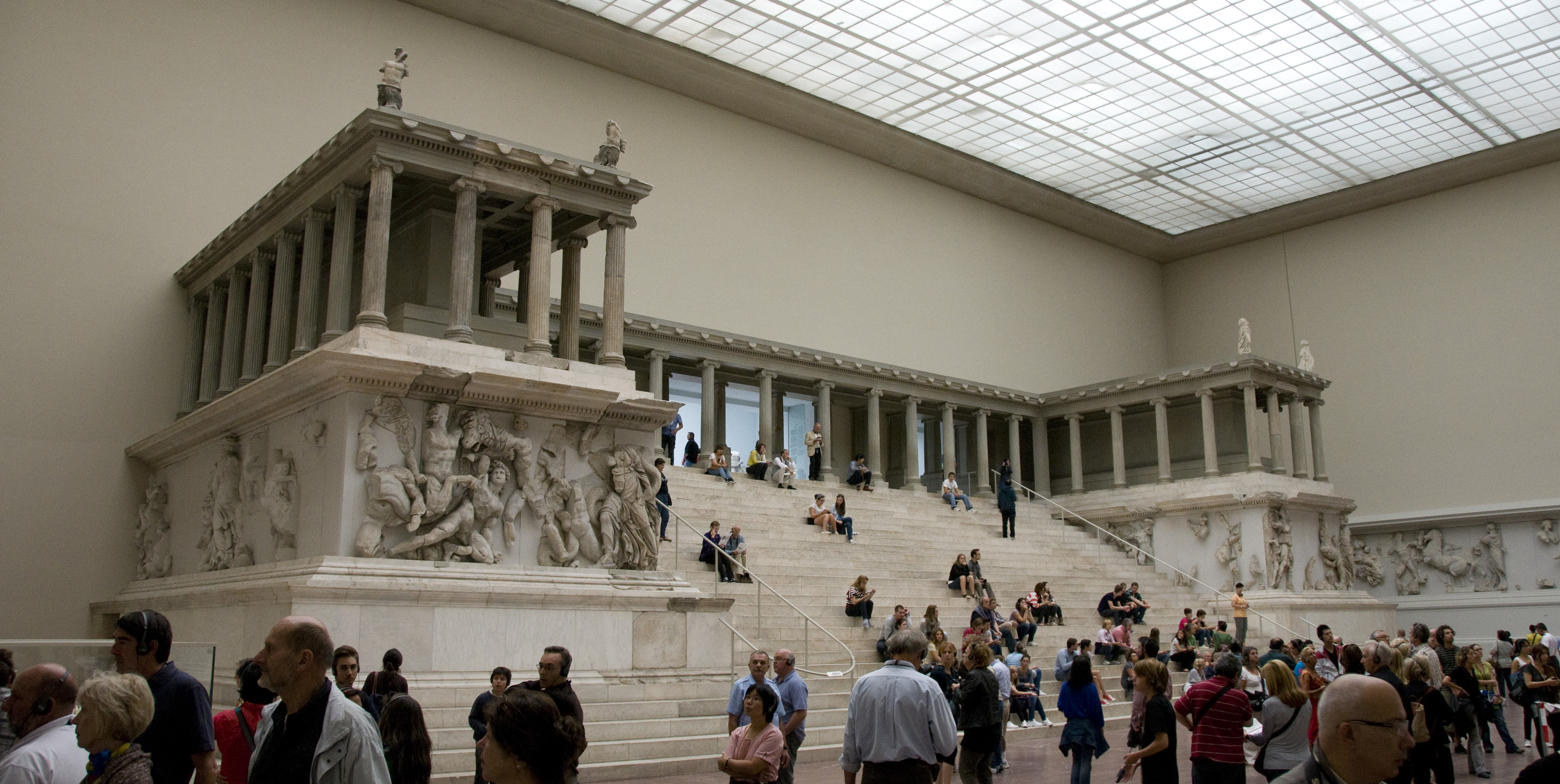 Altar van Zeus in het Pergamonmuseum, Berlijn